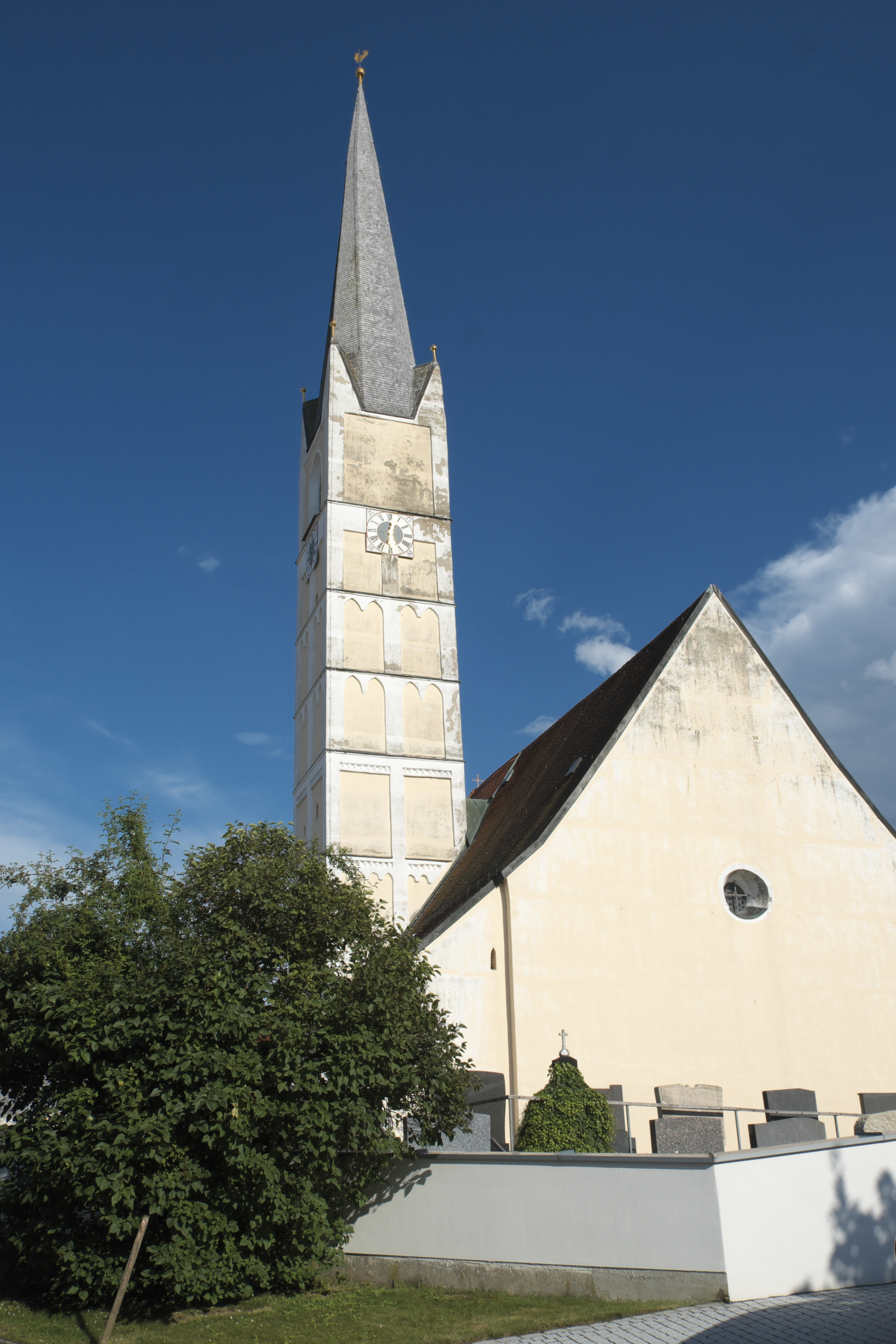 Katholische Filialkirche St. Remigius in Lappach (Sankt Wolfgang) im oberbayerischen Landkreis Erding (Bayern/Deutschland)